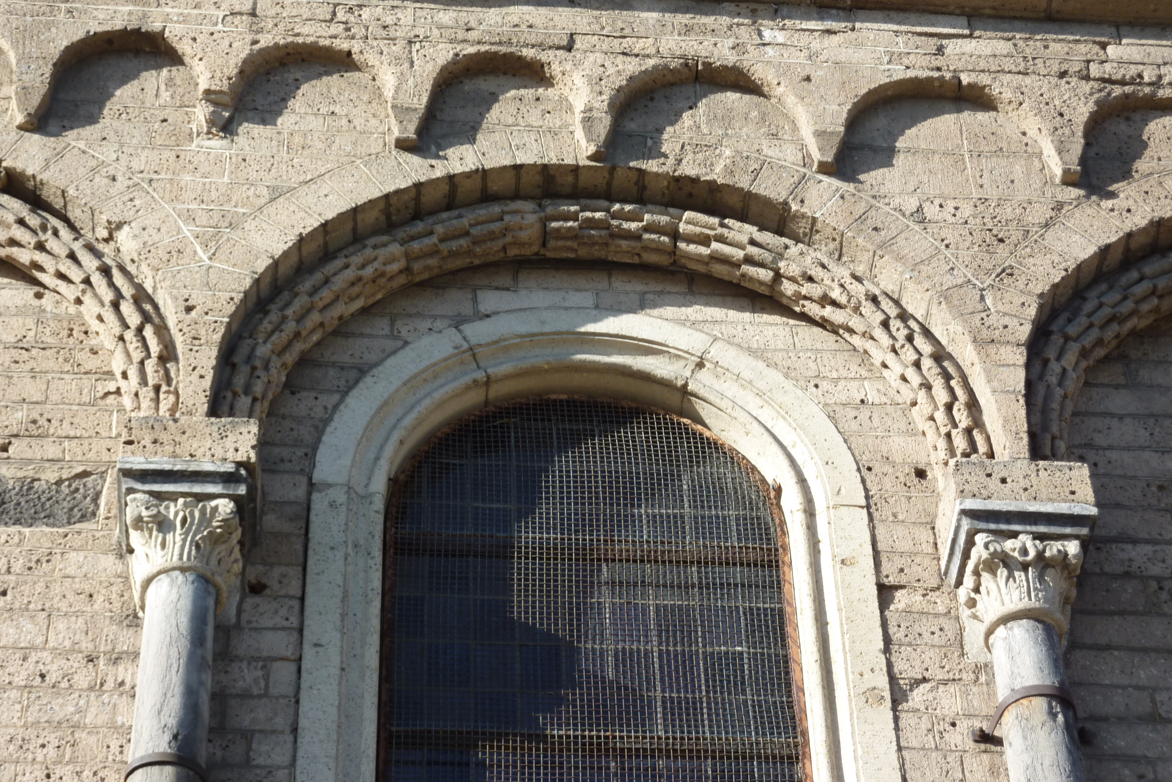 Kapelle St. Michael in Andernach: Bogenfries